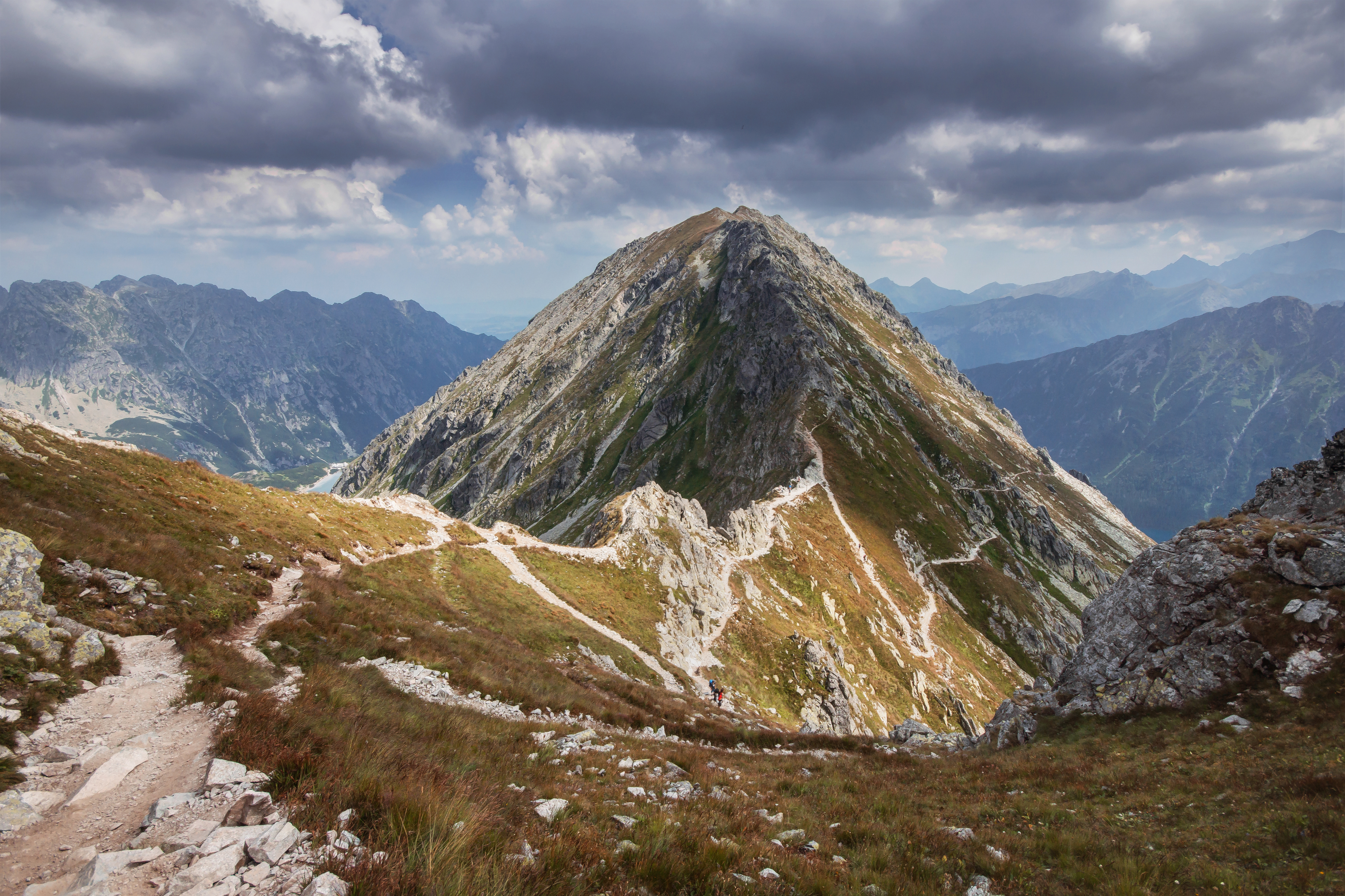 Specjalny obszar ochrony siedlisk: Tatry Miedziane widziane ze Szpiglasowego Wierchu This is a photography of protected area with CRFOP ID PL.ZIPOP.1393.N2K.PLC120001.H